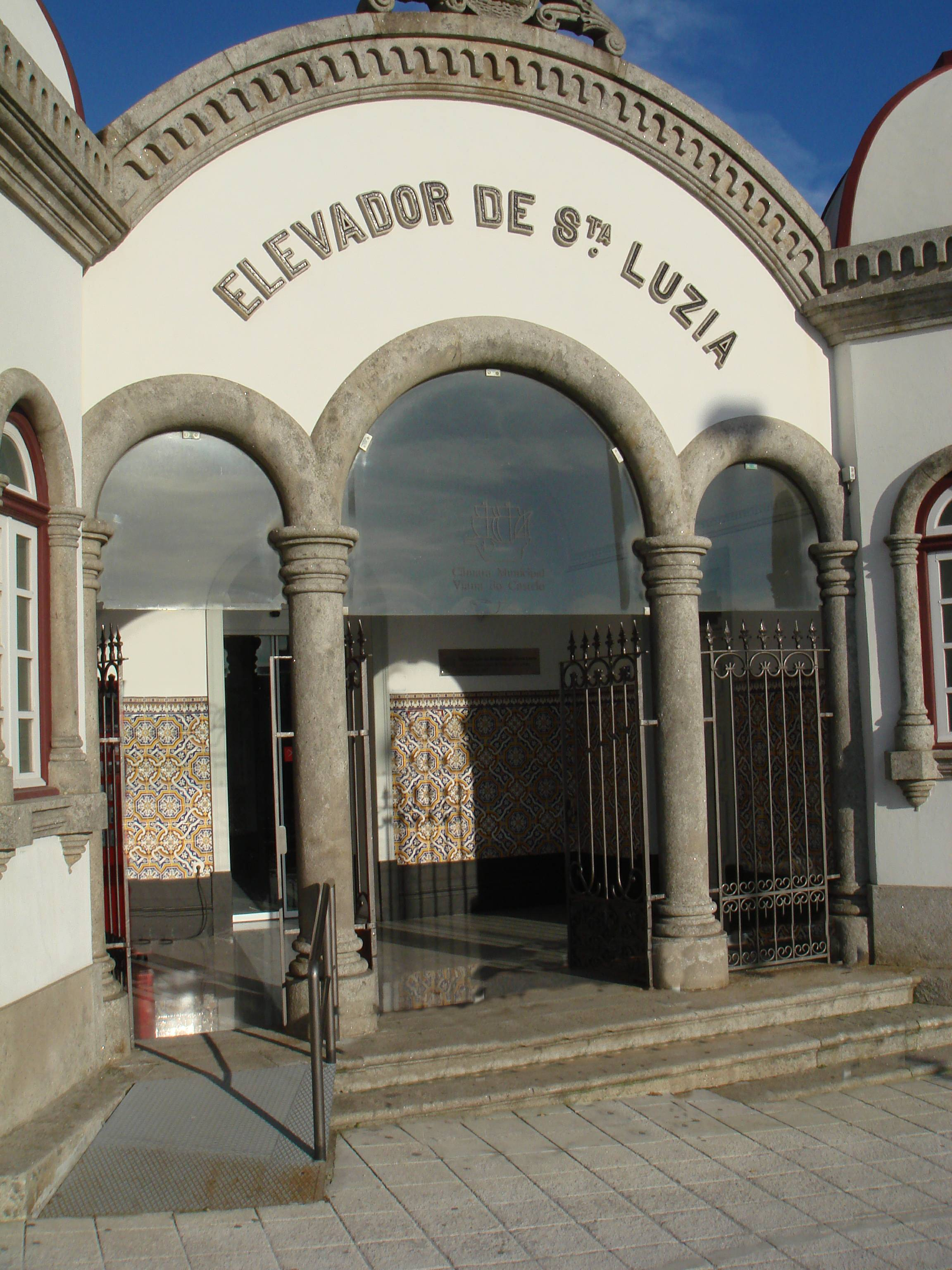 Santa Luzia Funicular Entrance in Viana do Castelo Portugal